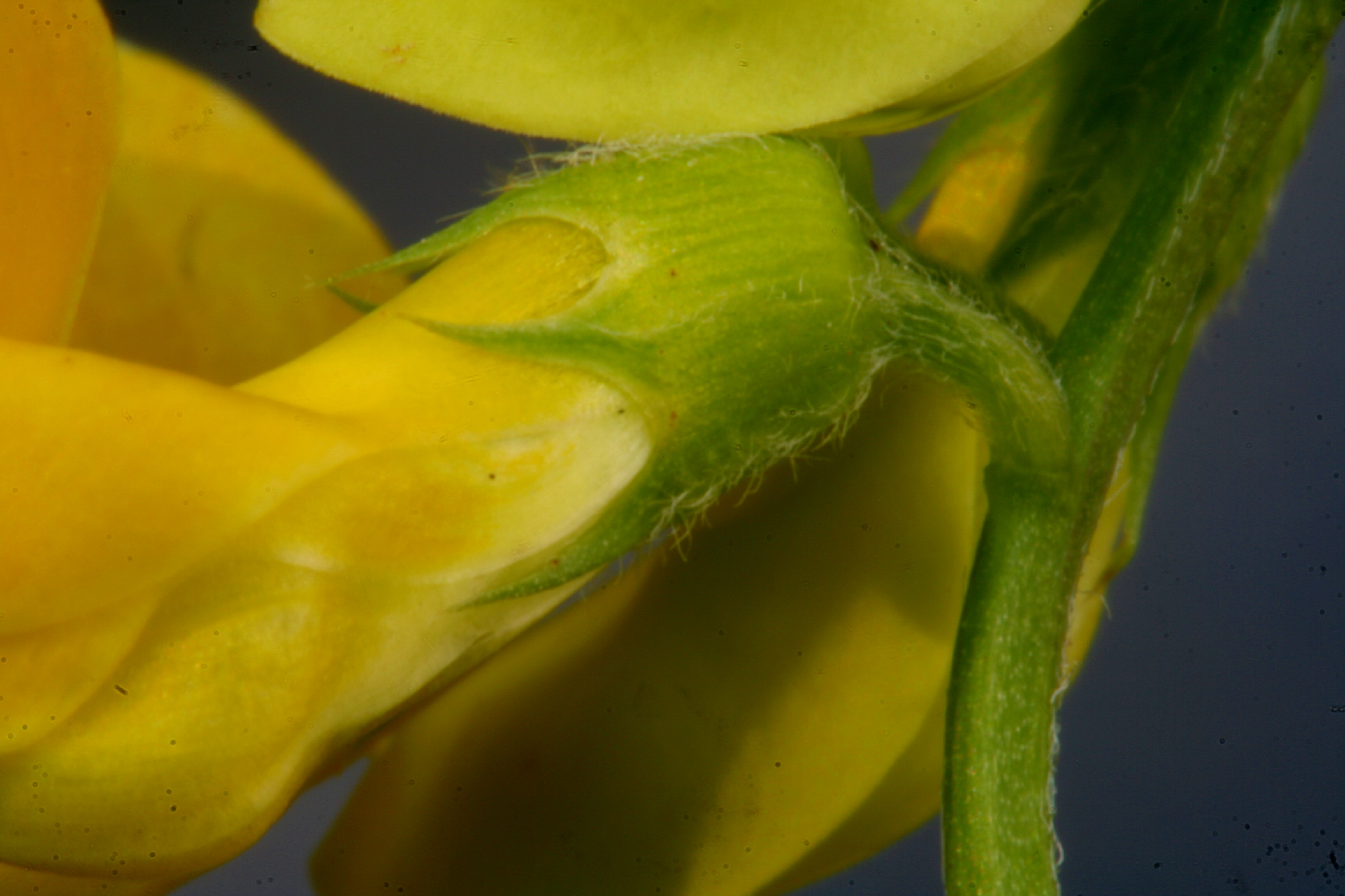 Lathyrus_pratensis (Cicerchia dei prati) Località Cortina (BL) 1300 m s.l.m.